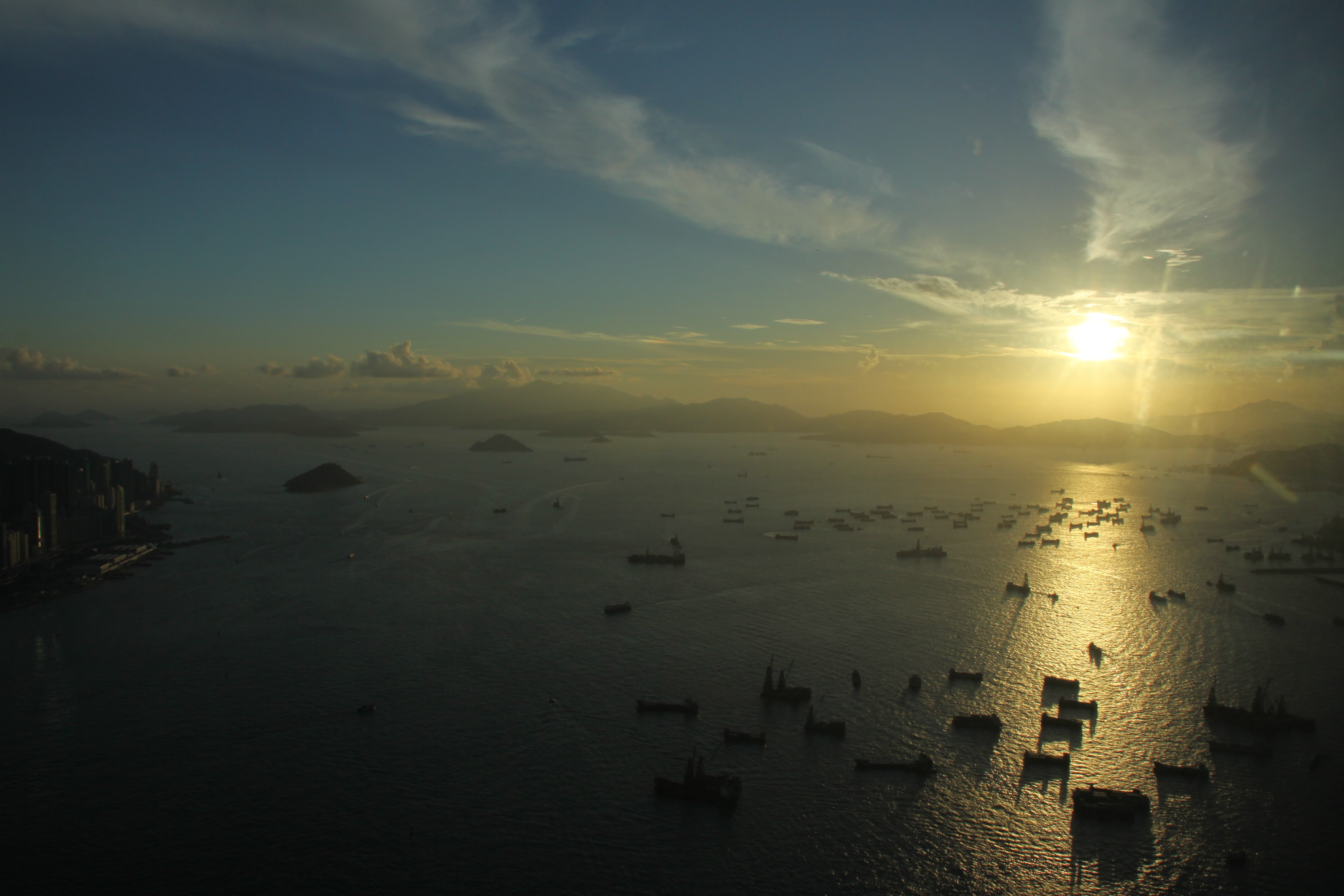 Ships in Hong Kong